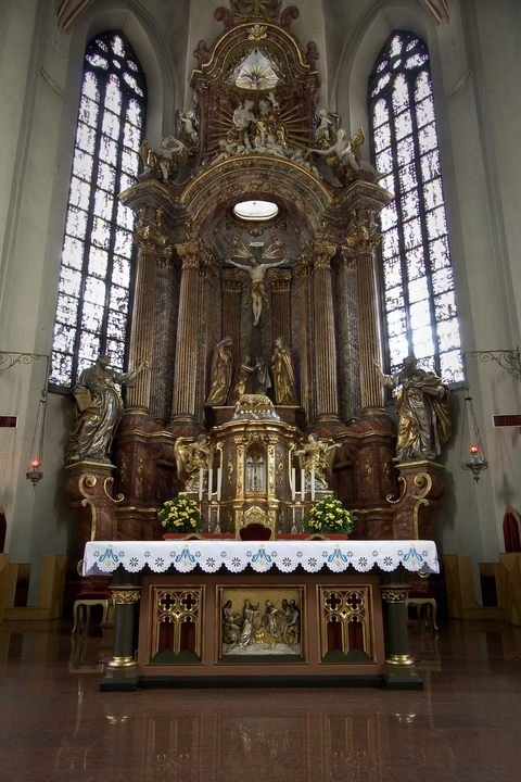 Opole Katedra Podwyzszenia Krzyza